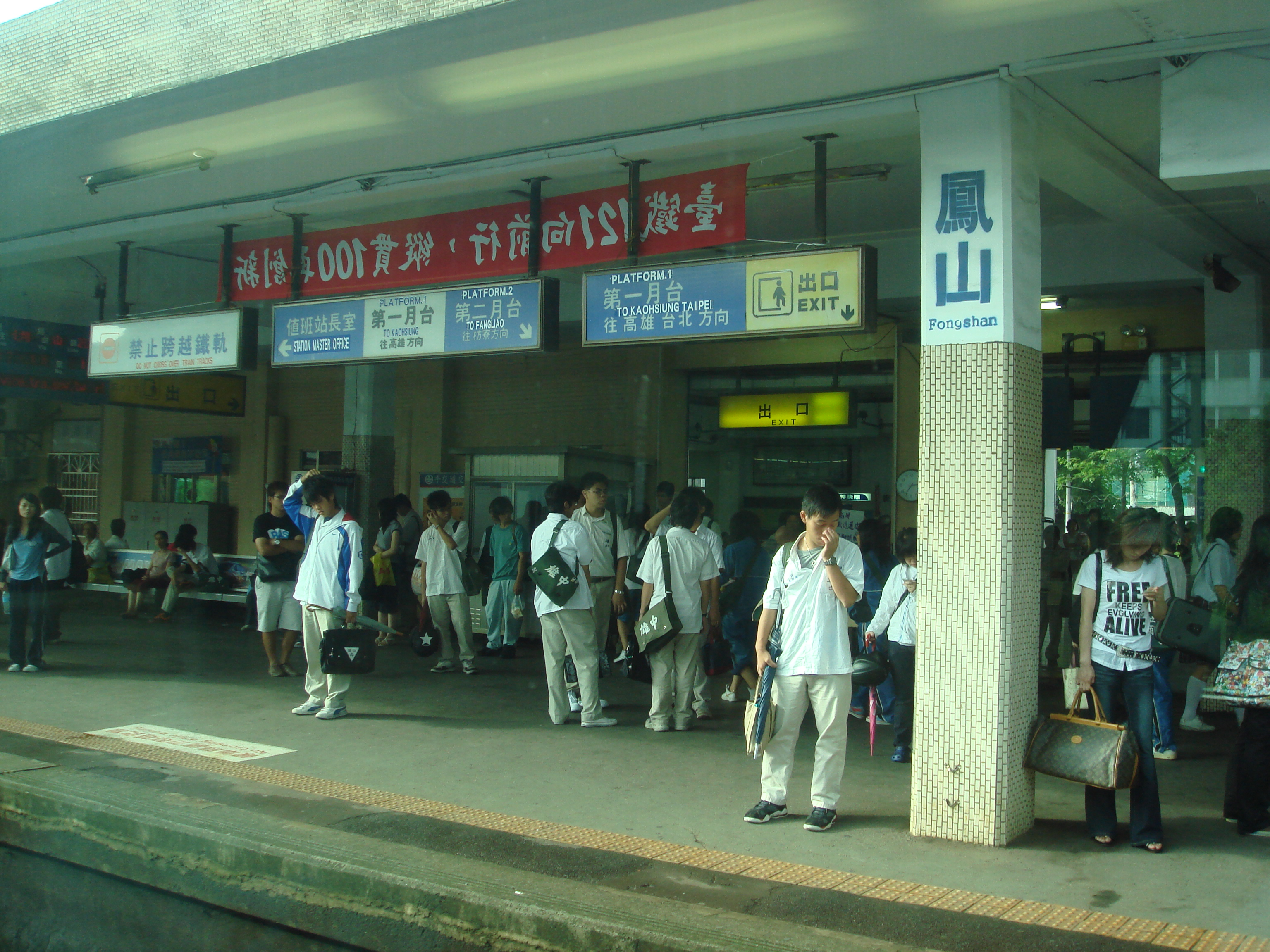 中文（台灣）: 臺灣鐵路管理局鳳山車站第一月台。本照片係從對面列車上拍攝。